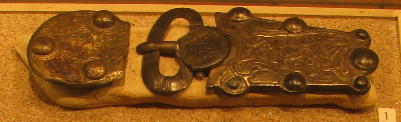 Plaque-boucle et contre-plaque, de type aquitain, bronze moulé. Provenant des fouilles d'une nécropole mérovingienne à Brèves, Nièvre, France. Exposés au musée Romain-Rolland de Clamecy, Nièvre, France.